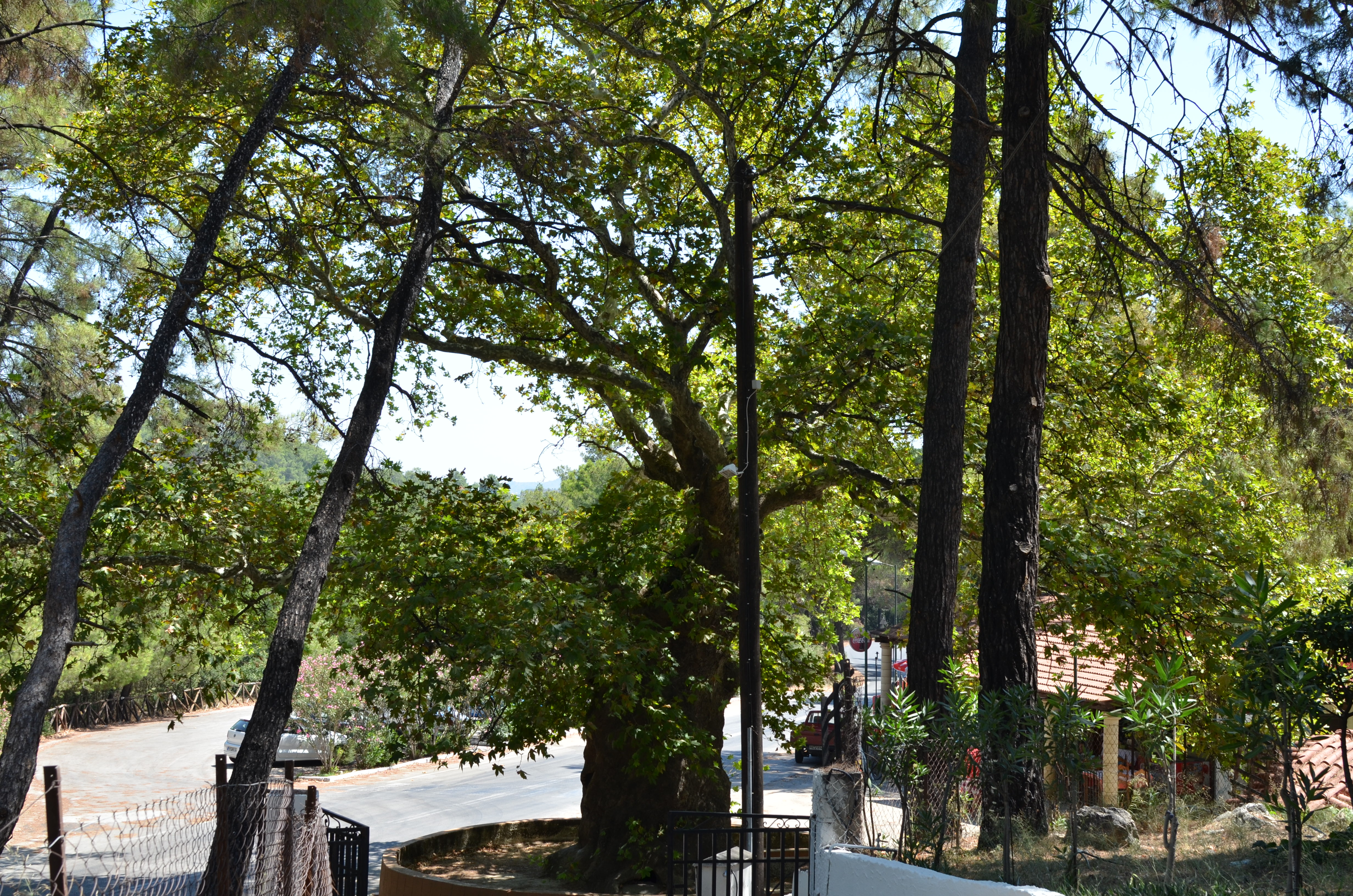 Památný platan, starý mohutný strom u kostelíka Agios Nektarios, Rhodos.